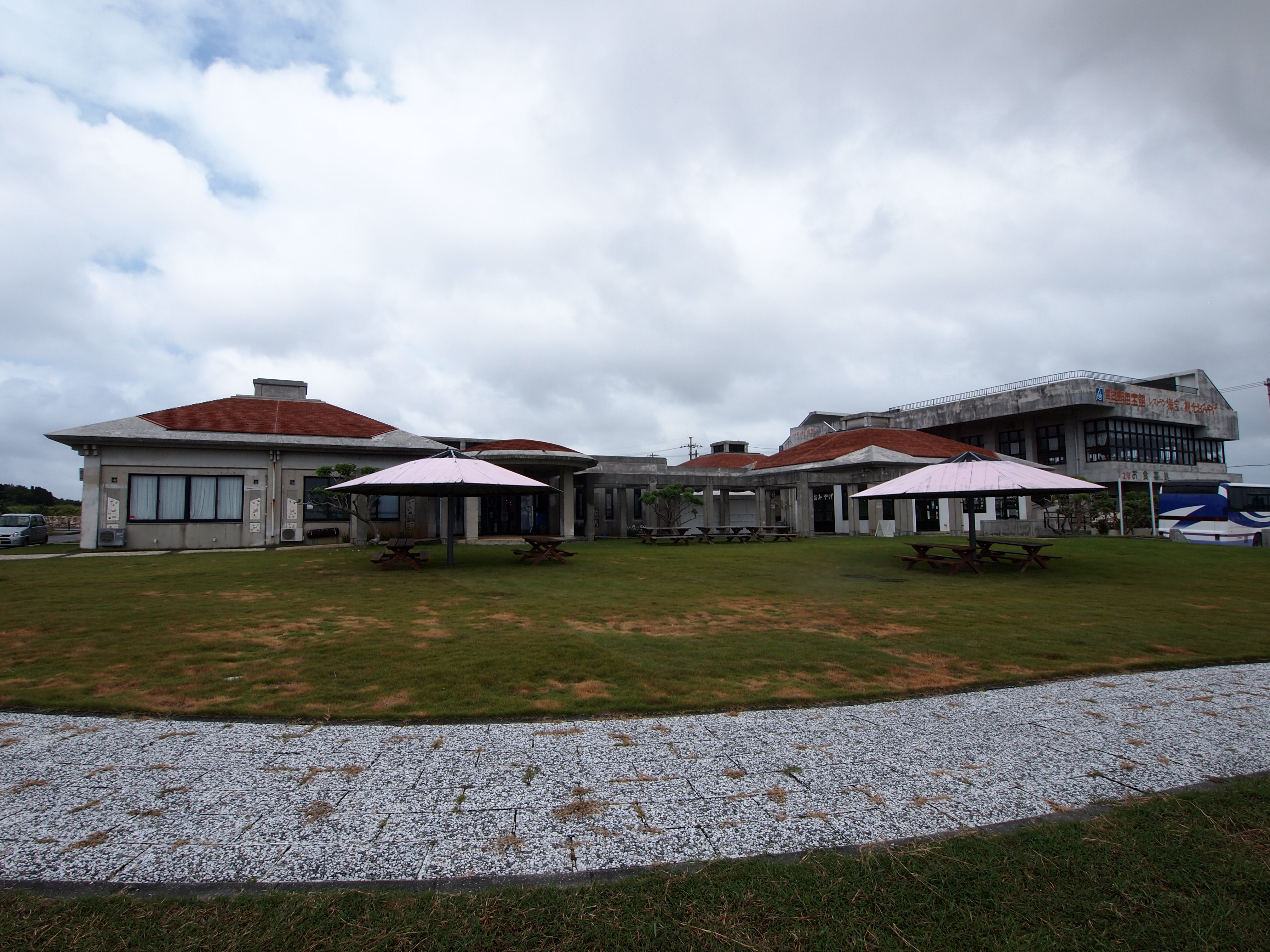 宮古島海宝館（沖縄県宮古島市宮古島）